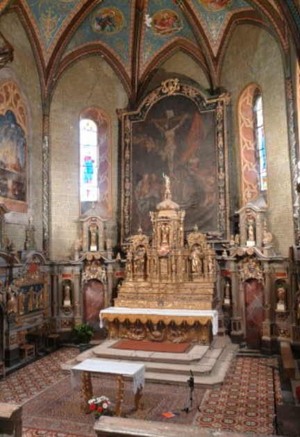 Coeur de l'église Saint Quirin